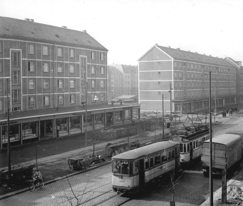 Dresden, Striesen, Borsbergstraße, Wohnblocks Zentralbild Löwe 4.3.1959 Fünf Jahre genossenschaftlicher Wohnungsbau in Dresden. Rund 2 500 moderne Wohnungen sind seit dem Erlaß der Verordnung zur Finanzierung des Arbeiterwohnungsbaues vom 4. März 1954 durch Genossenschaften in der Stadt Dresden fertiggestellt werden. Die 23 Arbeiterwohnungsbaugenossenschaften erhielten hierzu seit dem Erlaß dieser Verordnung, rund 66 Millionen DM an staatlichen Krediten. 1959 sind für den genossenschaftlichen Wohnungsbau allein 52 Millionen DM vorgesehen. UBz: Neue Wohnhäuser an der Borsbergstrasse in Dresden-Striesen, die in Großblockbauweise hergestellt wurden.